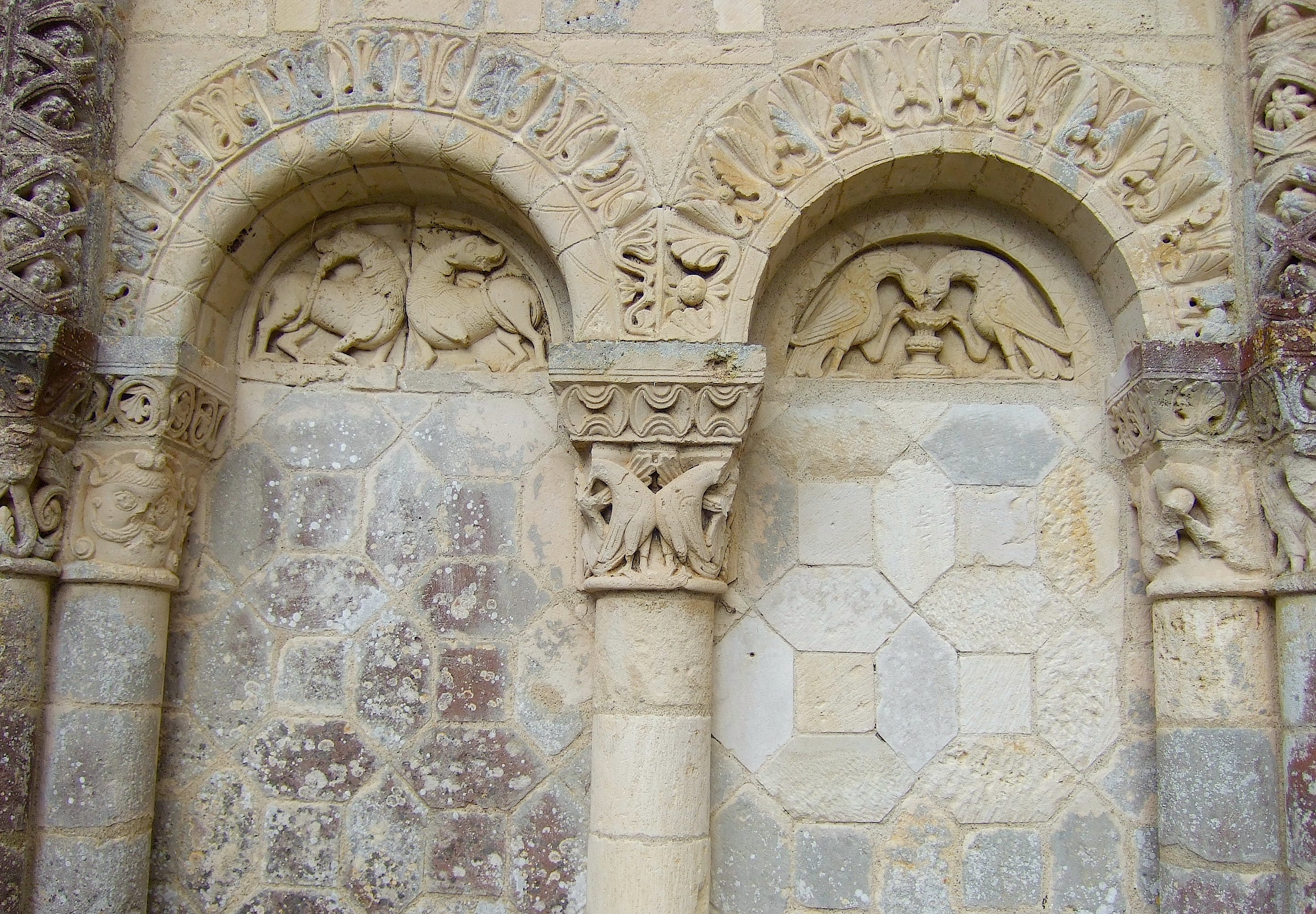 Vue des arcatures et tympans ouest de l'église XIIe siècle du prieuré de Villesalem (Vienne)